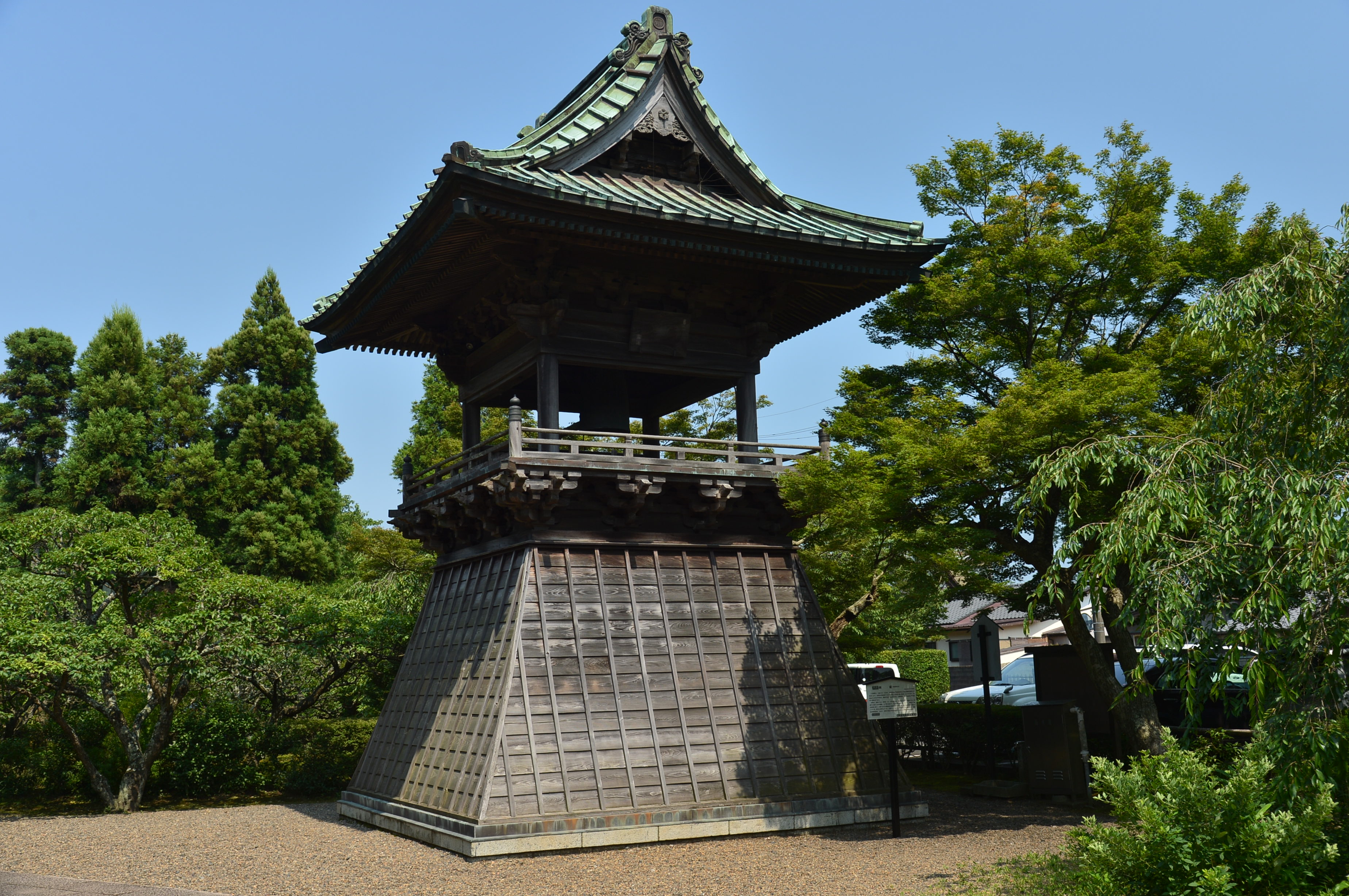 長勝寺の銅鐘（茨城県潮来市）